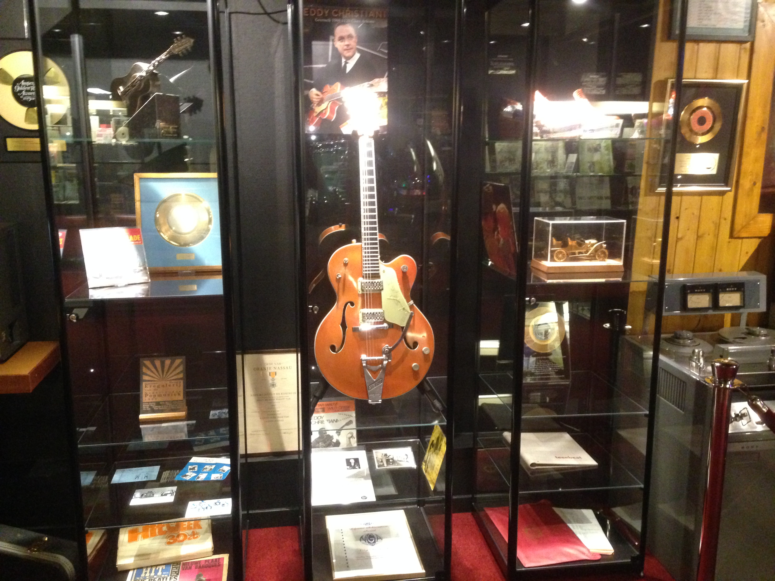 Museum RockArt, Hoek van Holland, Netherlands